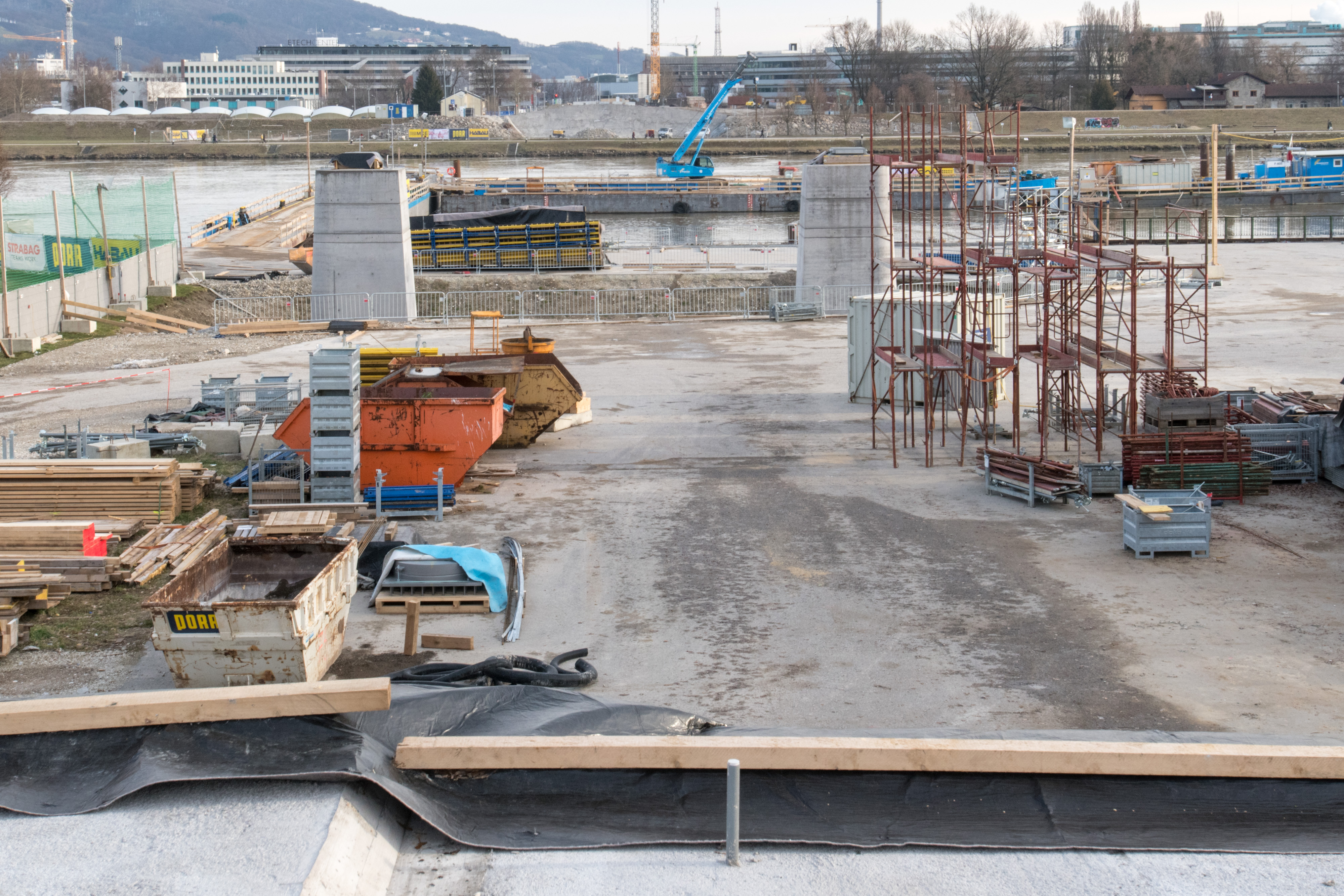 Neubau Eisenbahnbrücke über die Donau in Linz